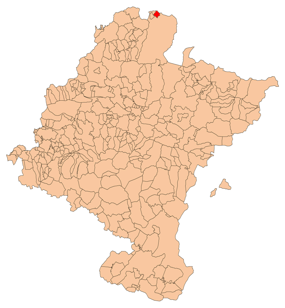 Urdazubi herria Nafarroako mapan kokatua.